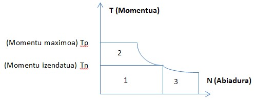 Lan-eremuen grafika